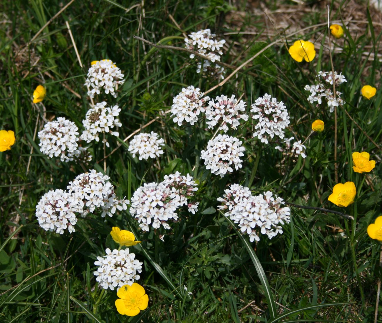 Noccaea praecox, Kreuzblütler (Brassicaceae) - Slowenien/Slovenija/Slovenia: Trnovski gozd, Kucelj